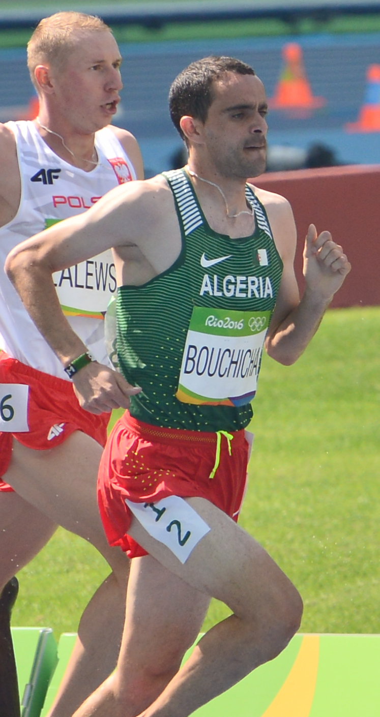 Série du 3000m steeple Homme des JO de Rio, 2016